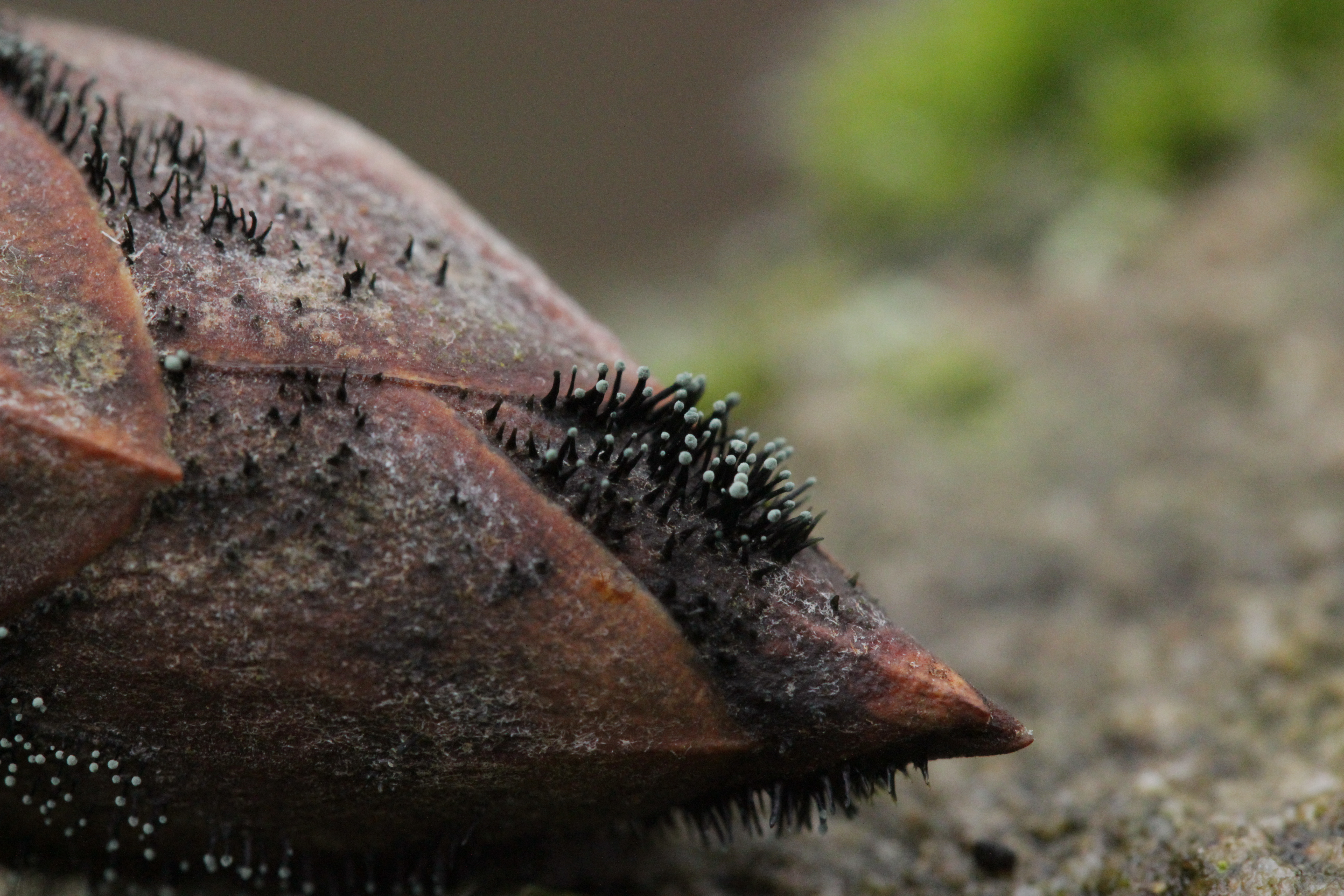 Seifertia azaleae